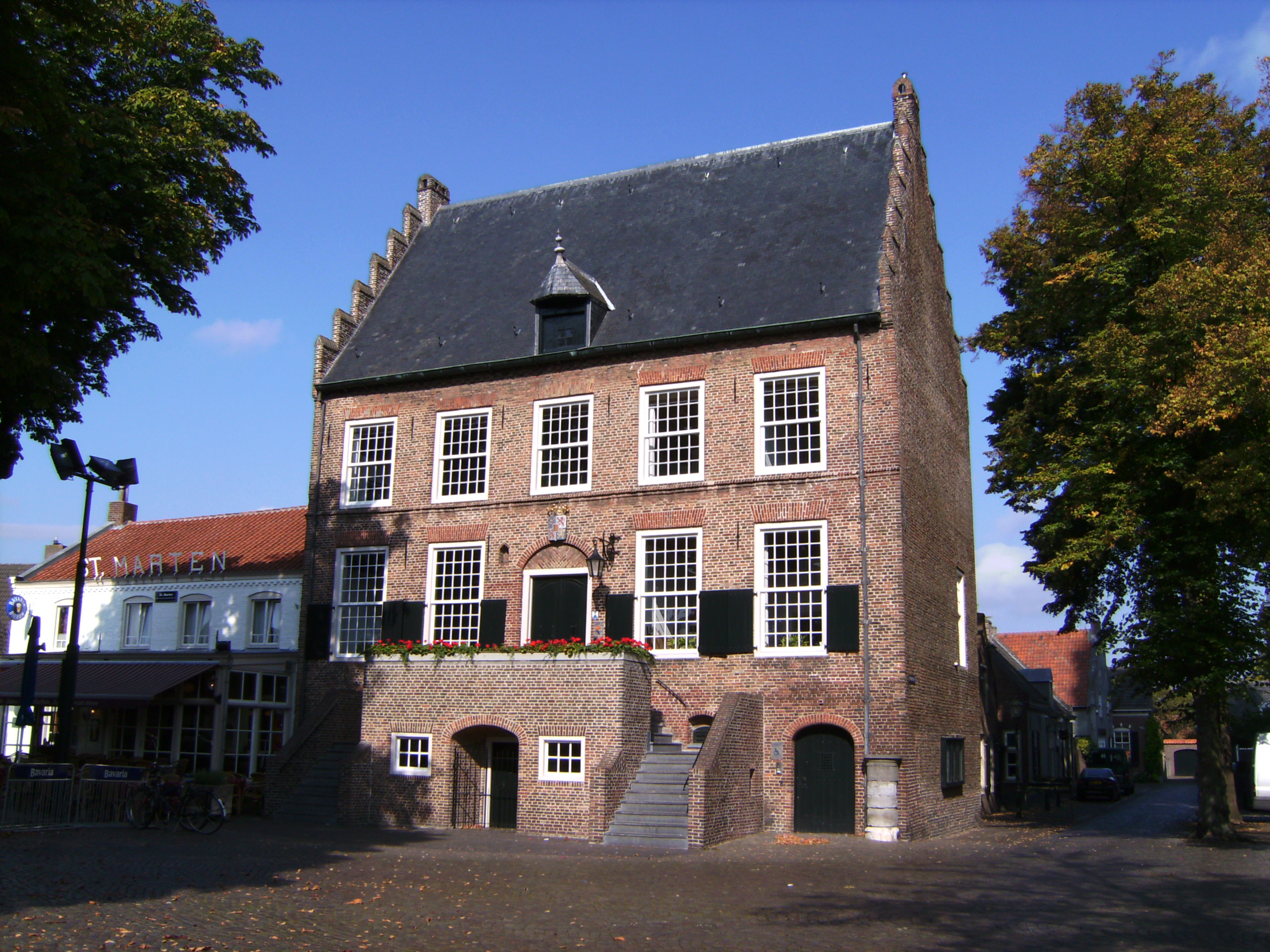 Oirschot, voormalig stadhuis